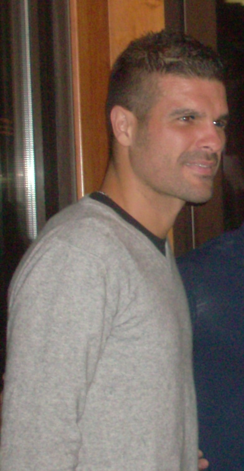 César Vinicio Cervo de Luca nel 2012